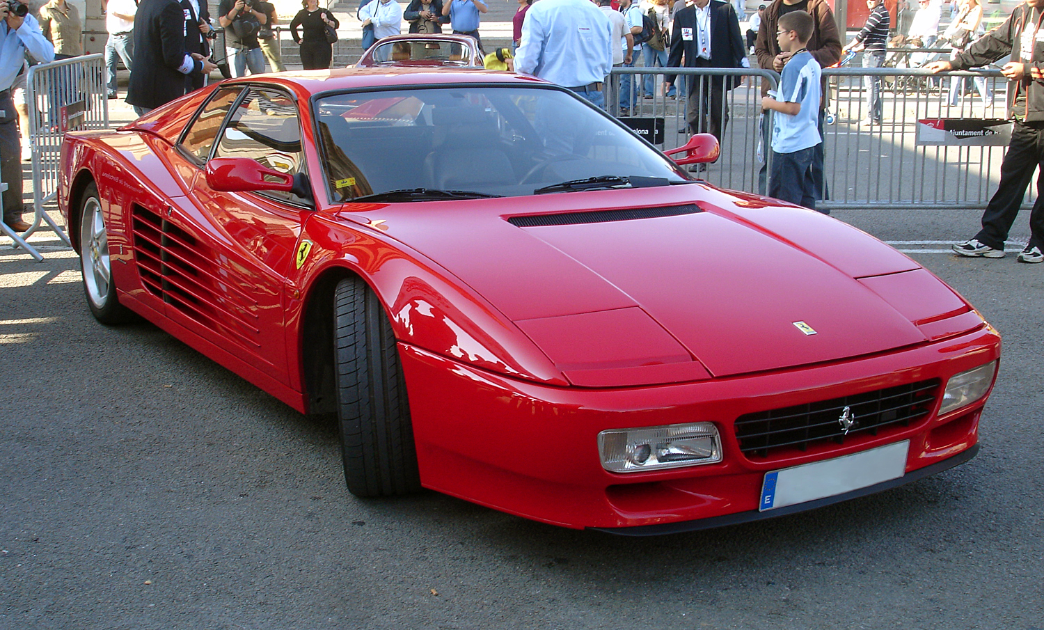 Ferrari Testarossa exposat al festival Martini Legends (commemoració del 75 aniversari del Circuit de Montjuïc)